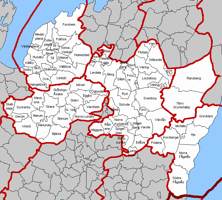 gamla socknar/kommuner runtom Skövde